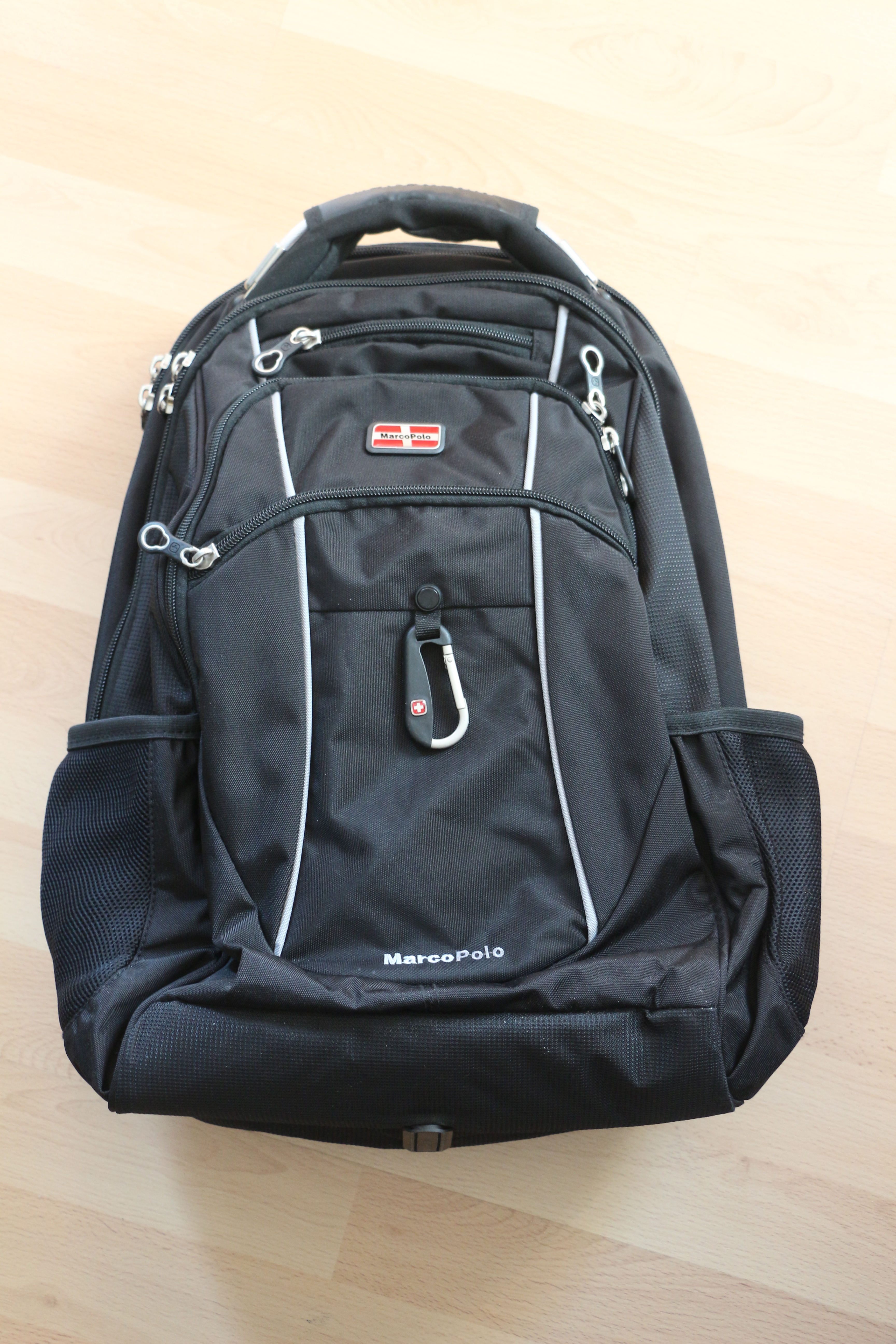 תיק גב של מותג מרקו פולו, של חברת קל גב.